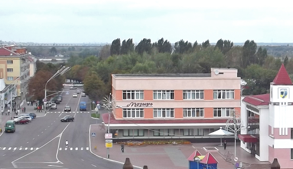 Центр города